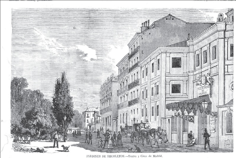 Jardines de Recoletos, Madrid, España. Teatro y Circo, 1869